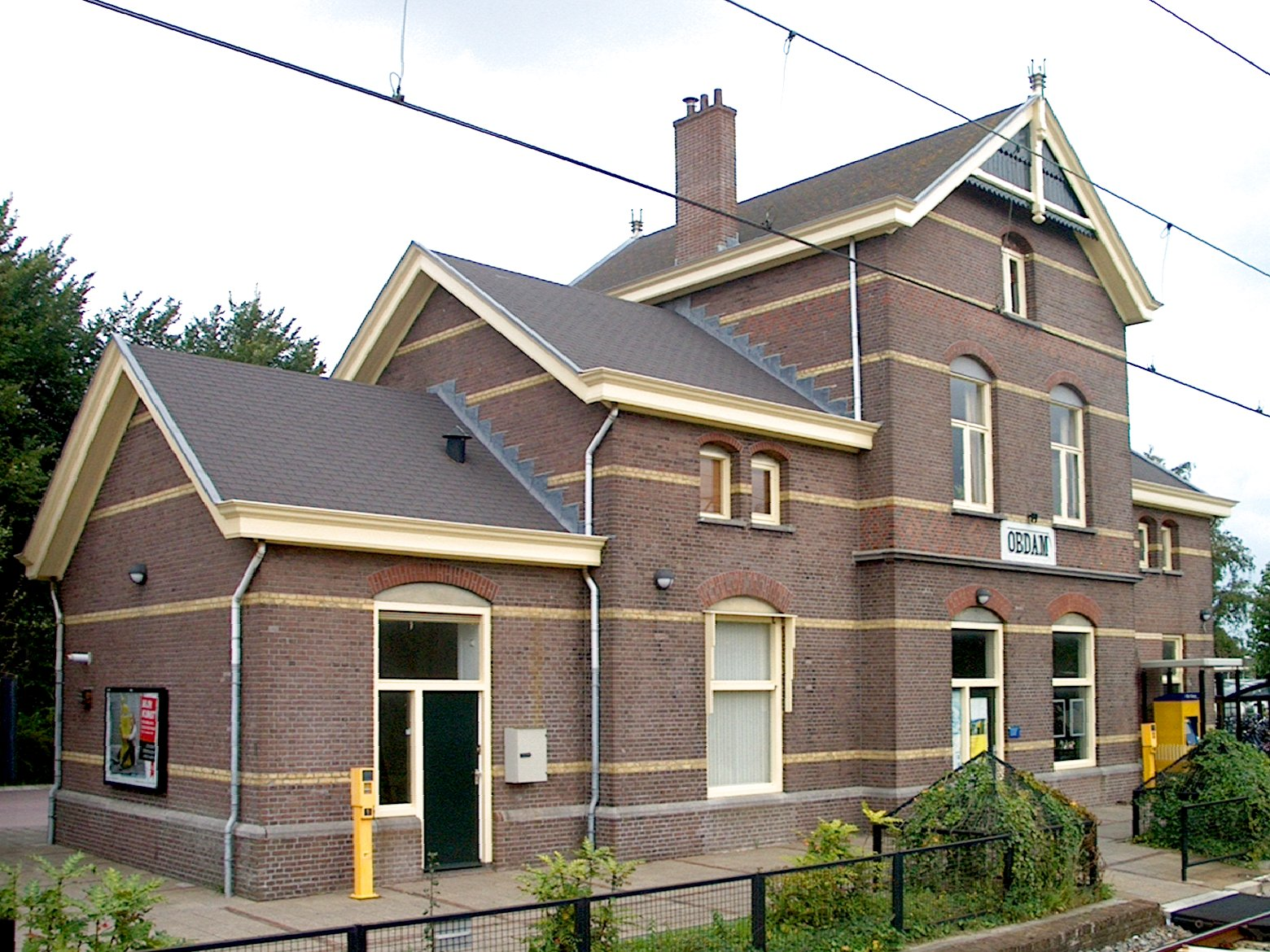 Station Obdam, Nederland